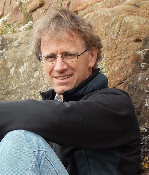 Der deutsche Schriftsteller Martin Bettinger